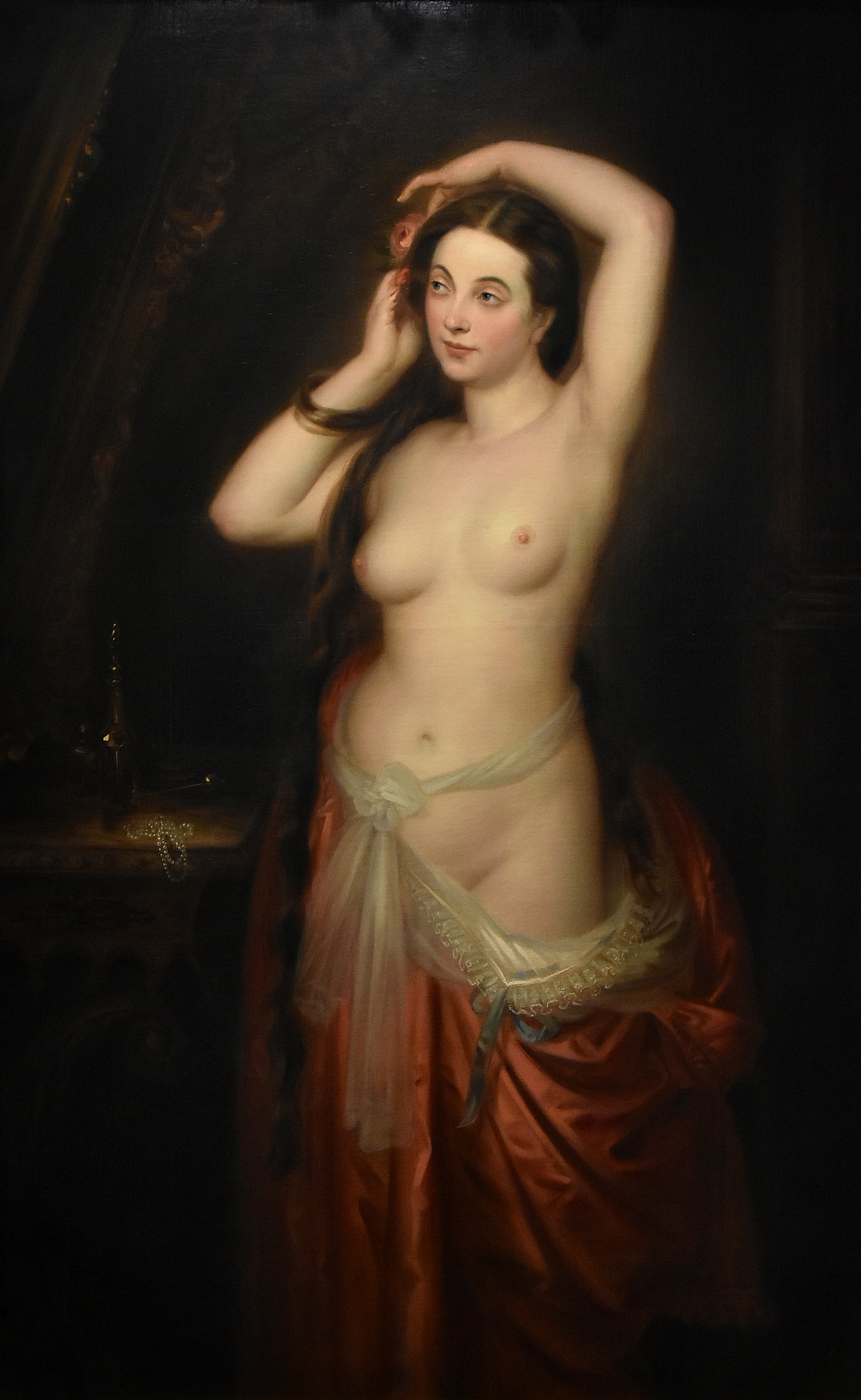 Antoine Wiertz (1806-1865) Rosine à sa toilette - La Boverie Luik 23-08-2018 This photo of movable heritage has been taken in the Walloon Region